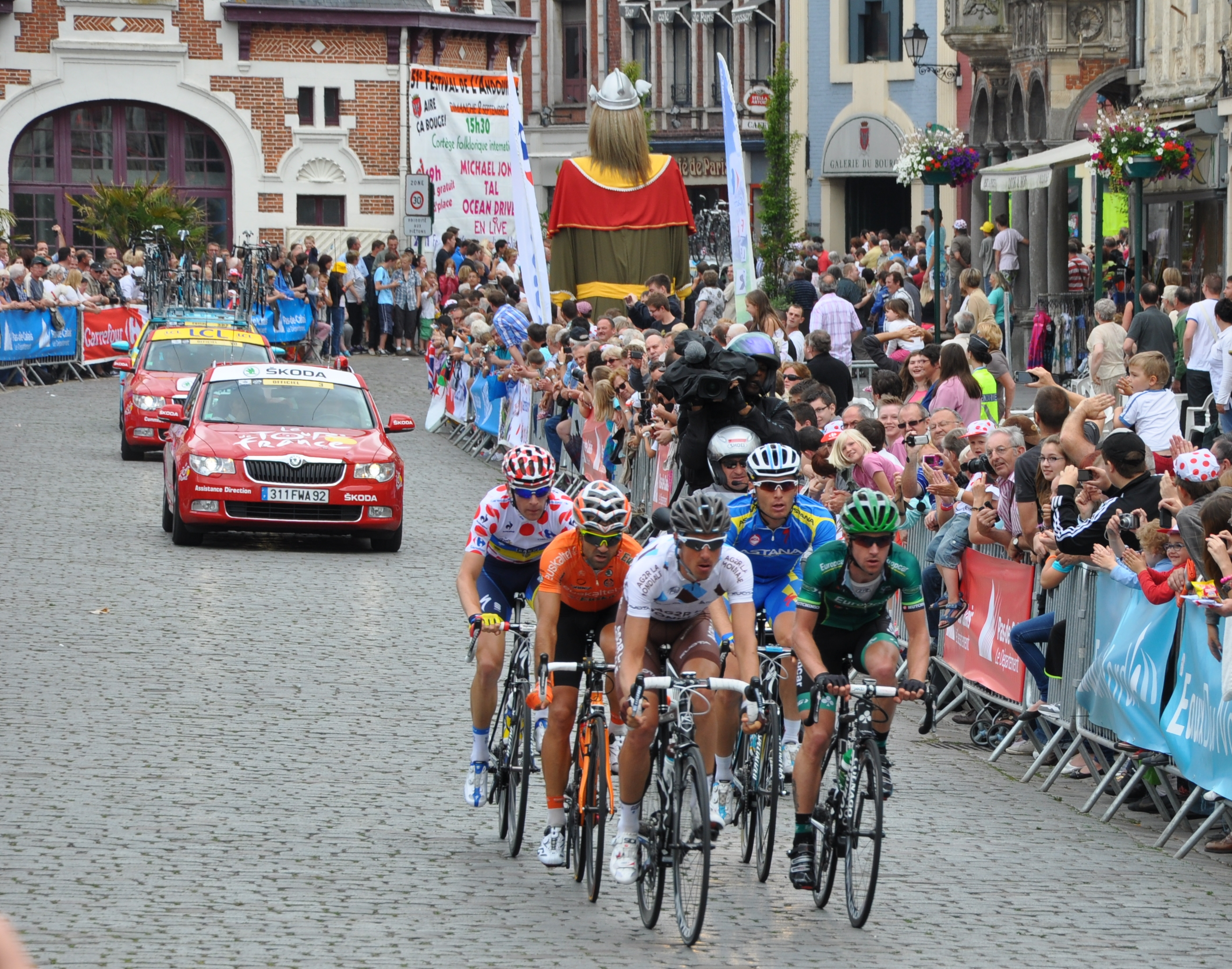 L'échappée de la 3e étape du Tour de France 2012. De gauche à droite: Michael Mørkøv, Rubén Pérez, Sébastien Minard, Andriy Hryvko et Giovanni Bernaudeau.